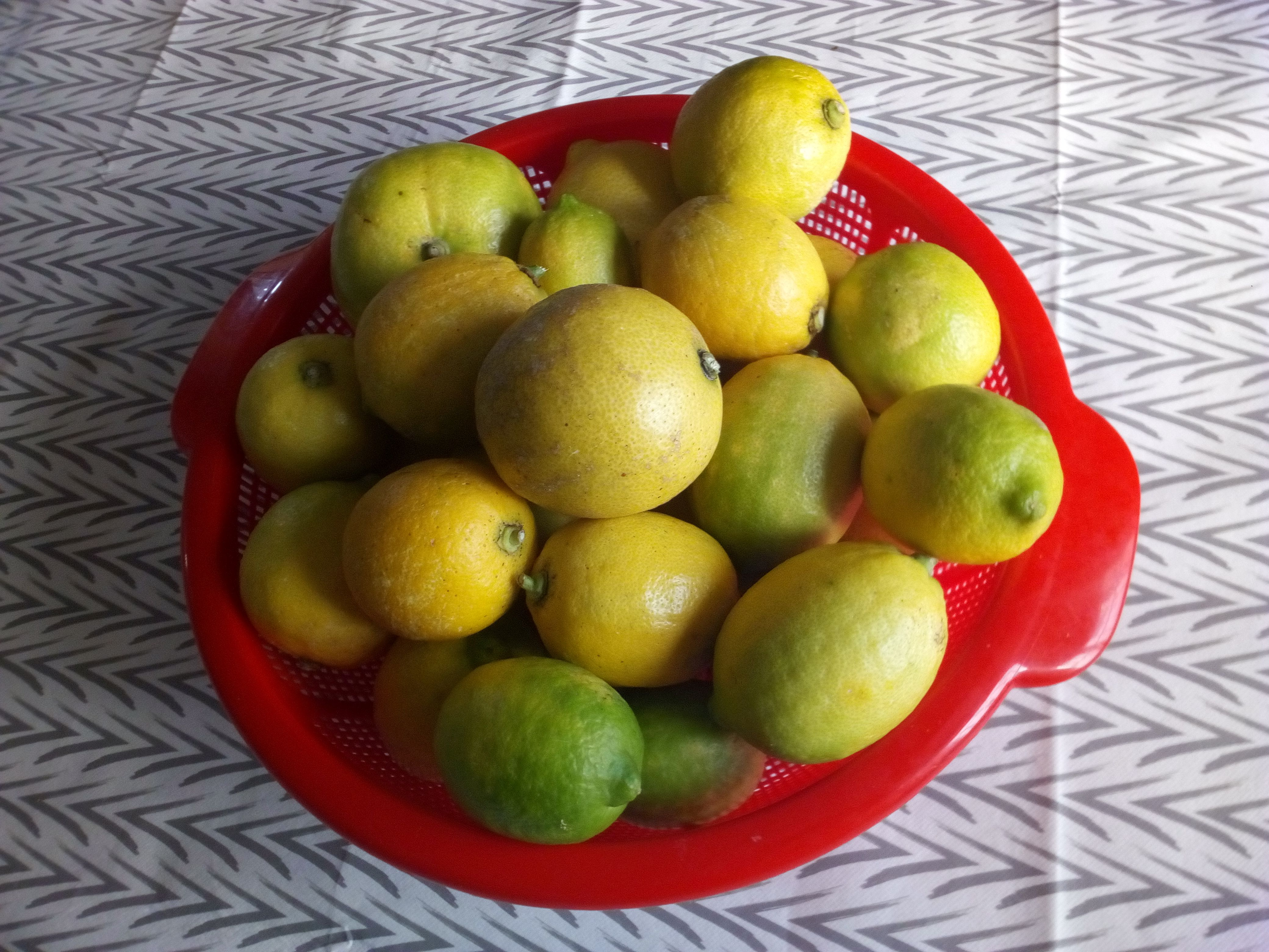 Citronaro en citronujo.